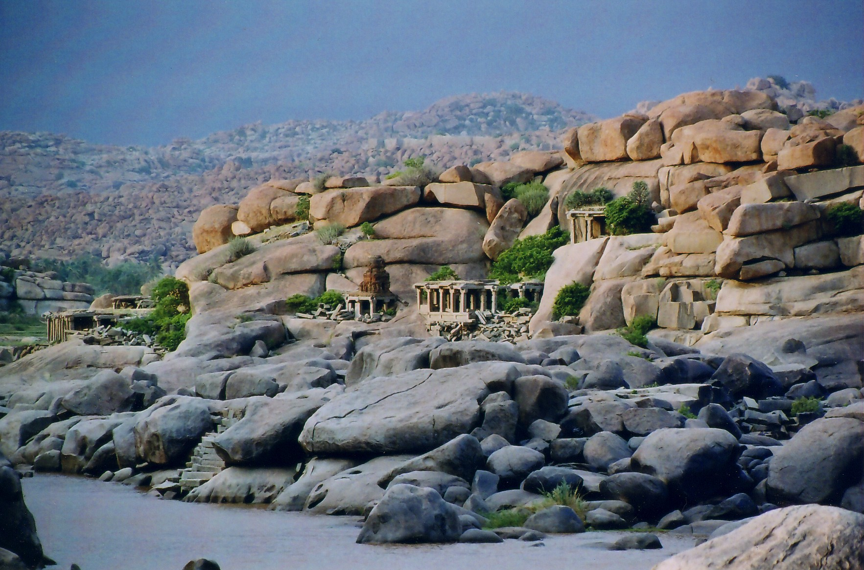 Photograph taken by Dineshkannambadi at Hampi, Karnataka state, India in June 2004